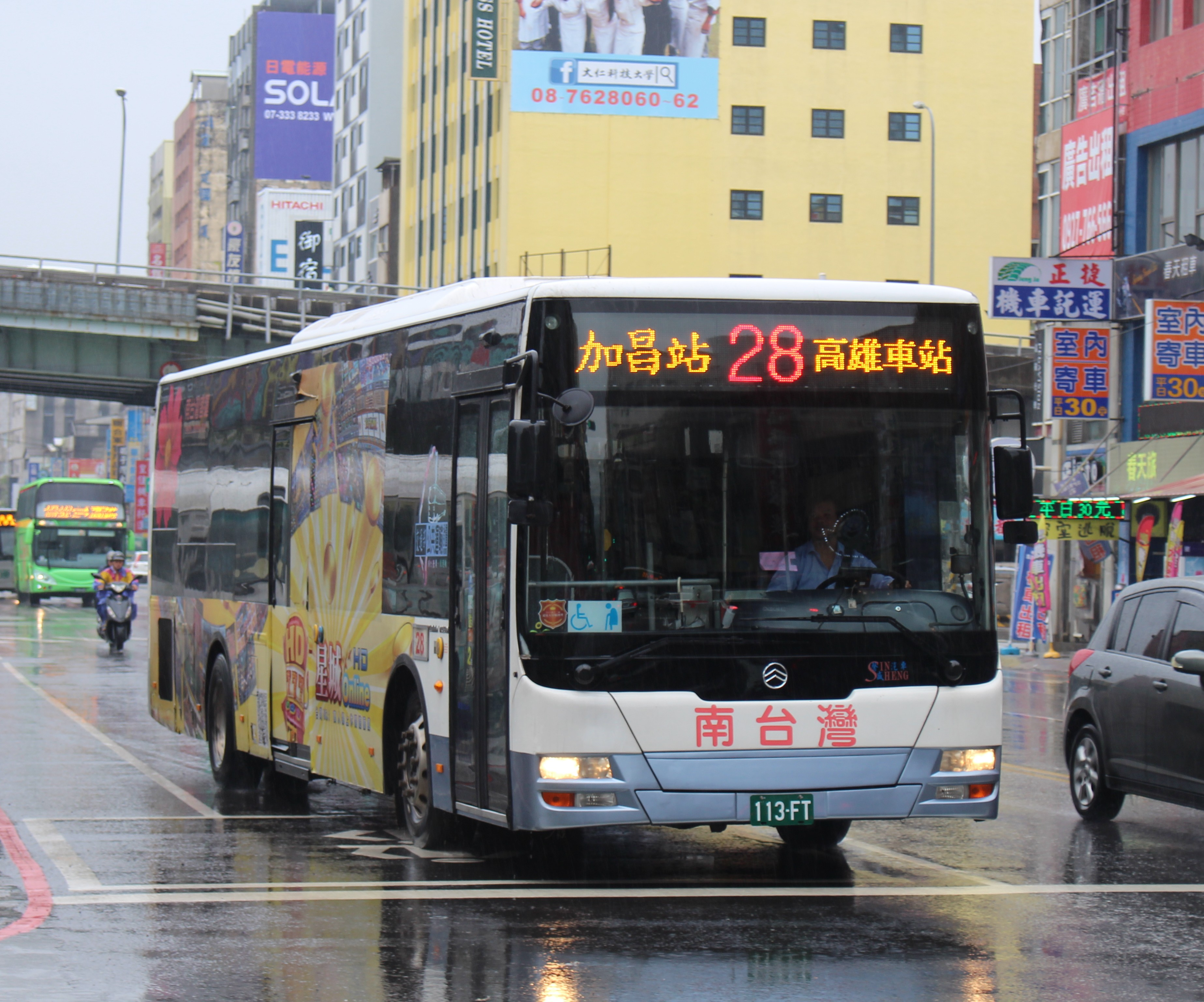 南台灣客運金旅XML6125J15C大客車113-FT，雨中行駛高雄市公車28線。